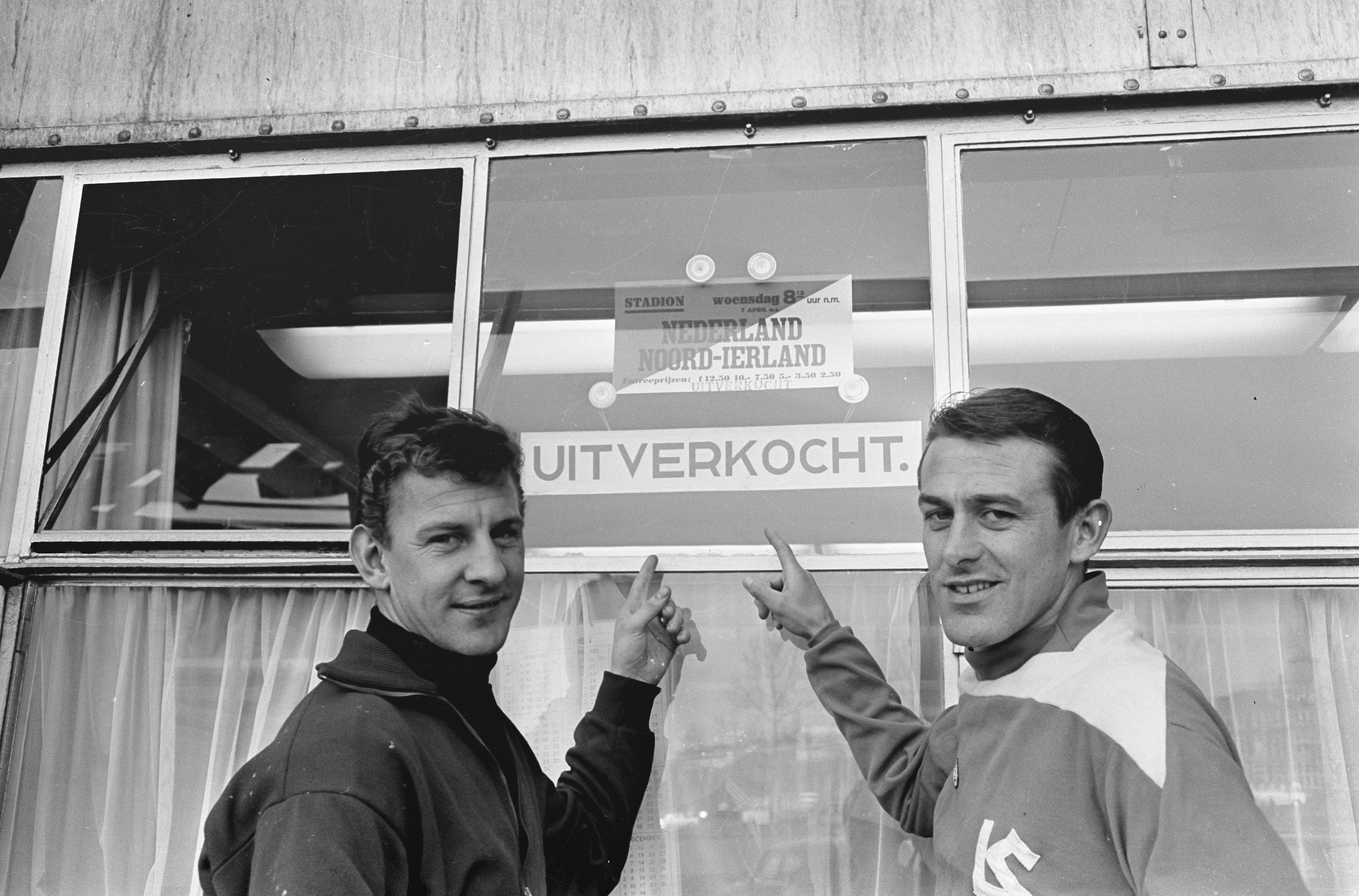 Photographie des footballeurs internationaux néerlandais Co Prins et Pierre Kerkhoffs (à droite) par Eric Koch / Anefo.